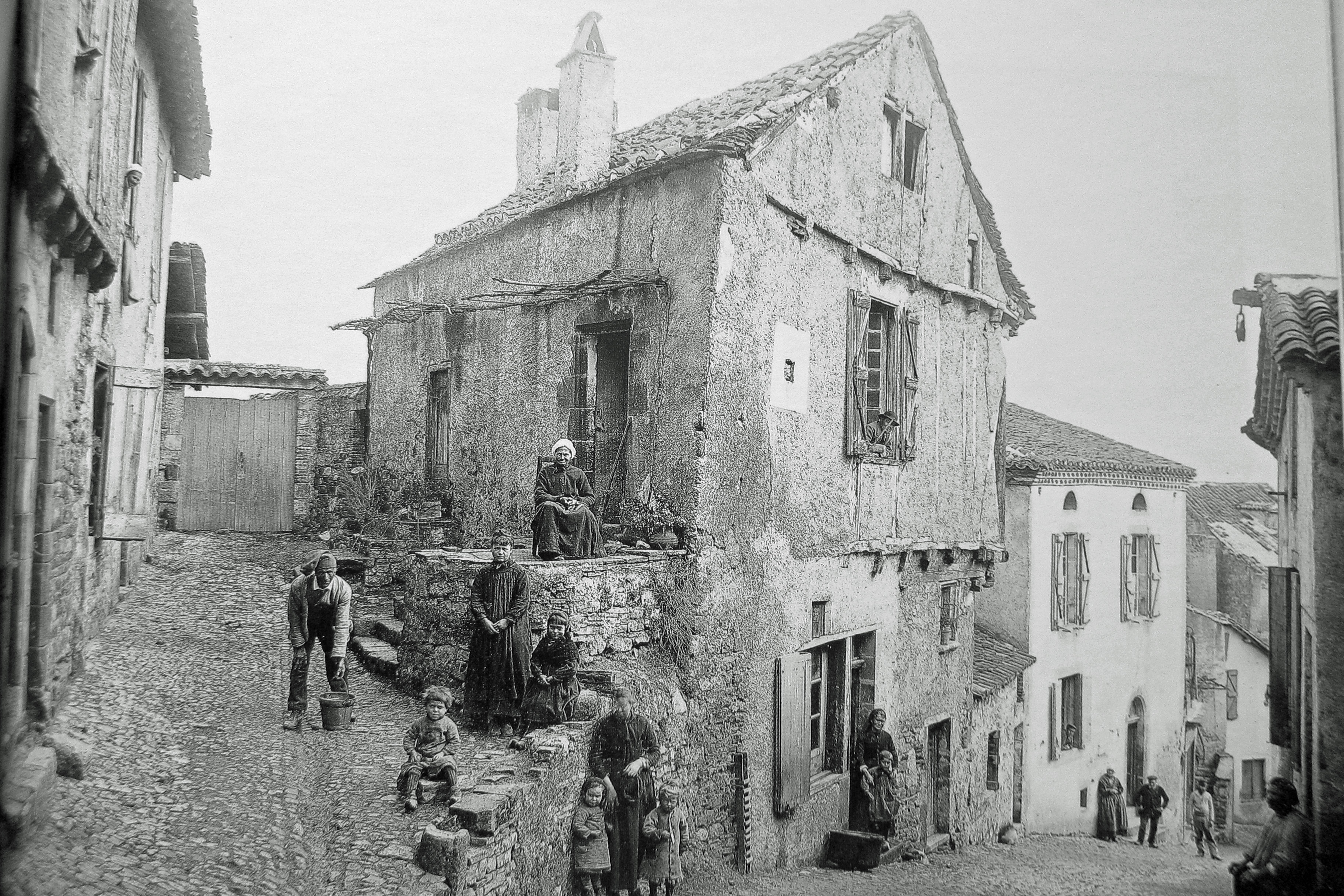 "Cordes. Vieille maison" Inv 009.0.361